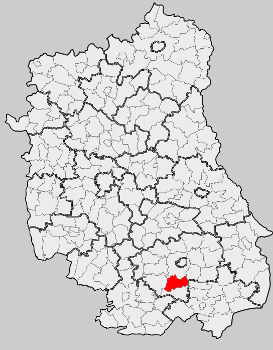 Map of gmina Adamów, Zamość county, Lublin voivodship Mapa gminy Adamów, powiat zamojski, województwo lubelskie